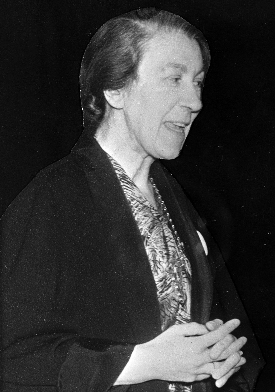 Annis Gillie